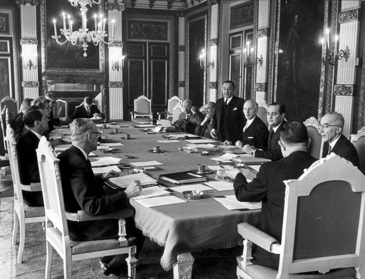 Nieuwe ministerraad kabinet De Jong (1967-1971) bijeen in de Trèveszaal. Rechts achter de tafel v.l.n.r: Bakker, Witteveen, De Jong, Middelburg, Merckelbach, Polak.Links: Udink, Klompé, Lardinois, De Block, Beernink. Den Haag, 7 april 1967.